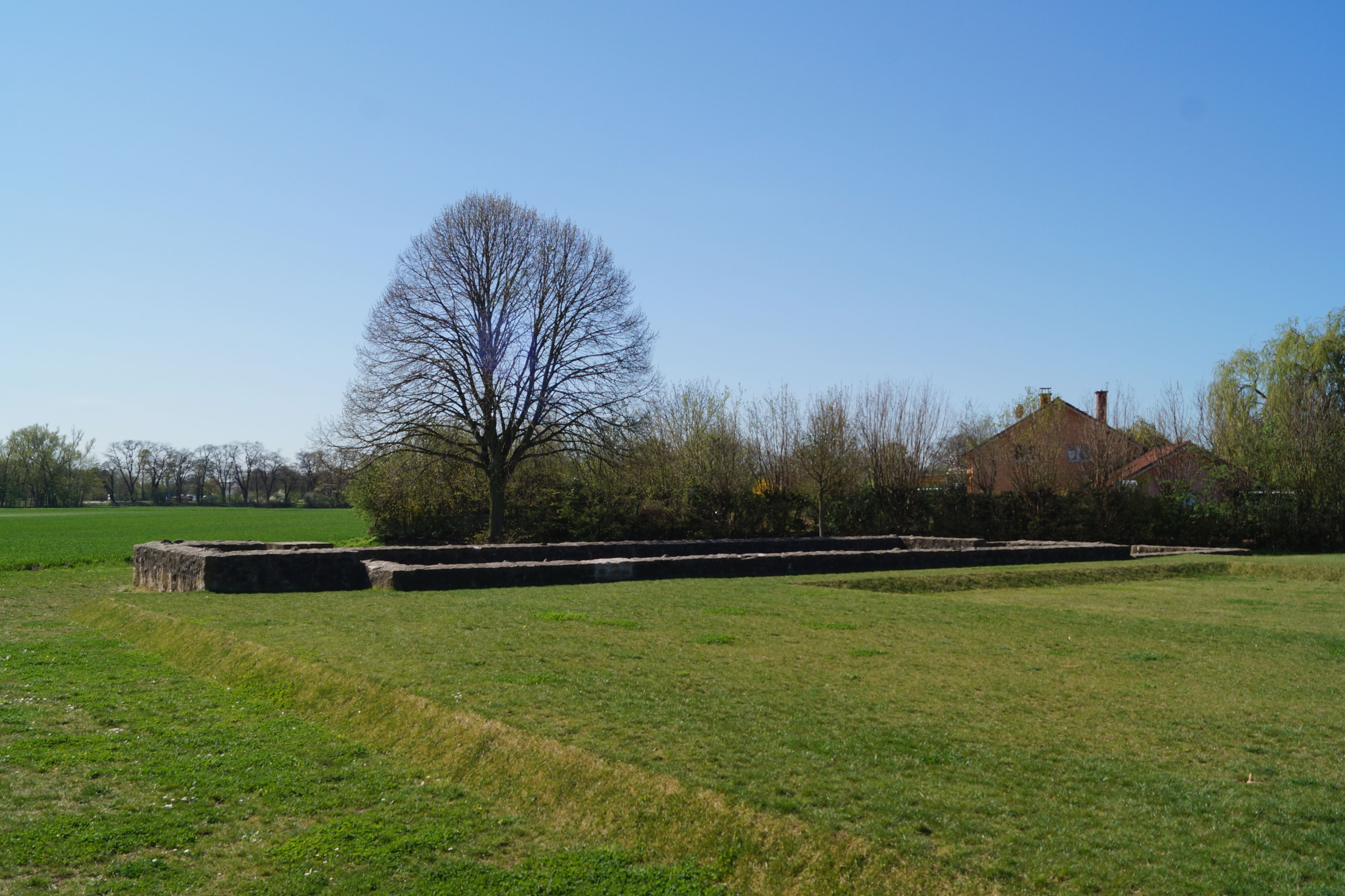 Kloster Altenmünster bei Lorsch, Blick auf die ältere Klosterkirche an der Weschnitz von NO.